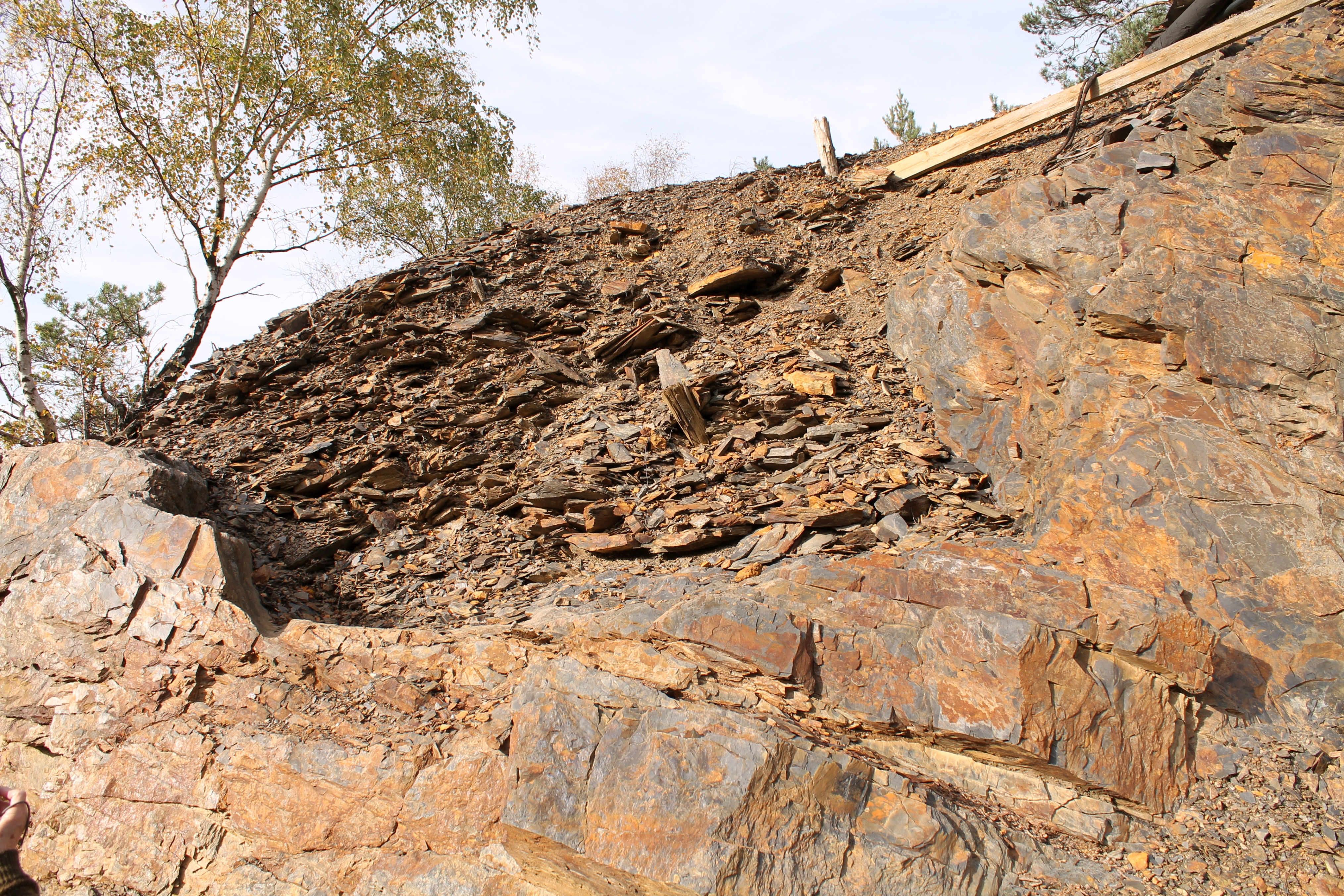 Hohlweg am Westrand des Ausbisses des Alten Lagers, oberhalb des Rammelsbergschachtes. Rammelsberg, Goslar, Niedersachsen, Deutschland.